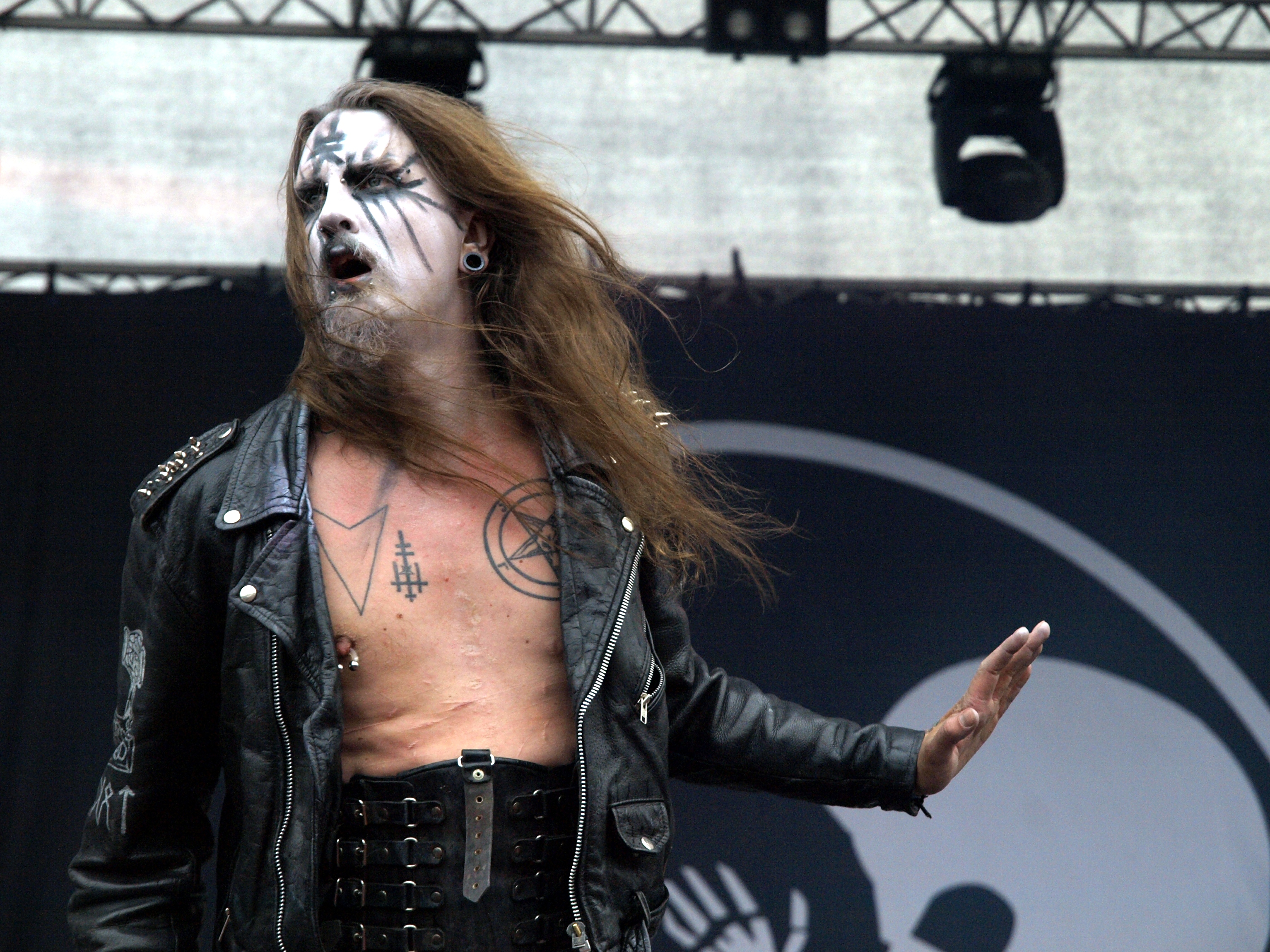 Turmion Kätilöt live am Myötätuulirock 2011